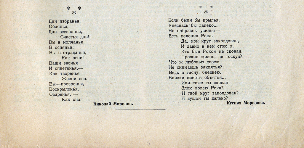 Стихи Николая и Ксении Морозовых в журнале "Нива", 1918 год, № 36